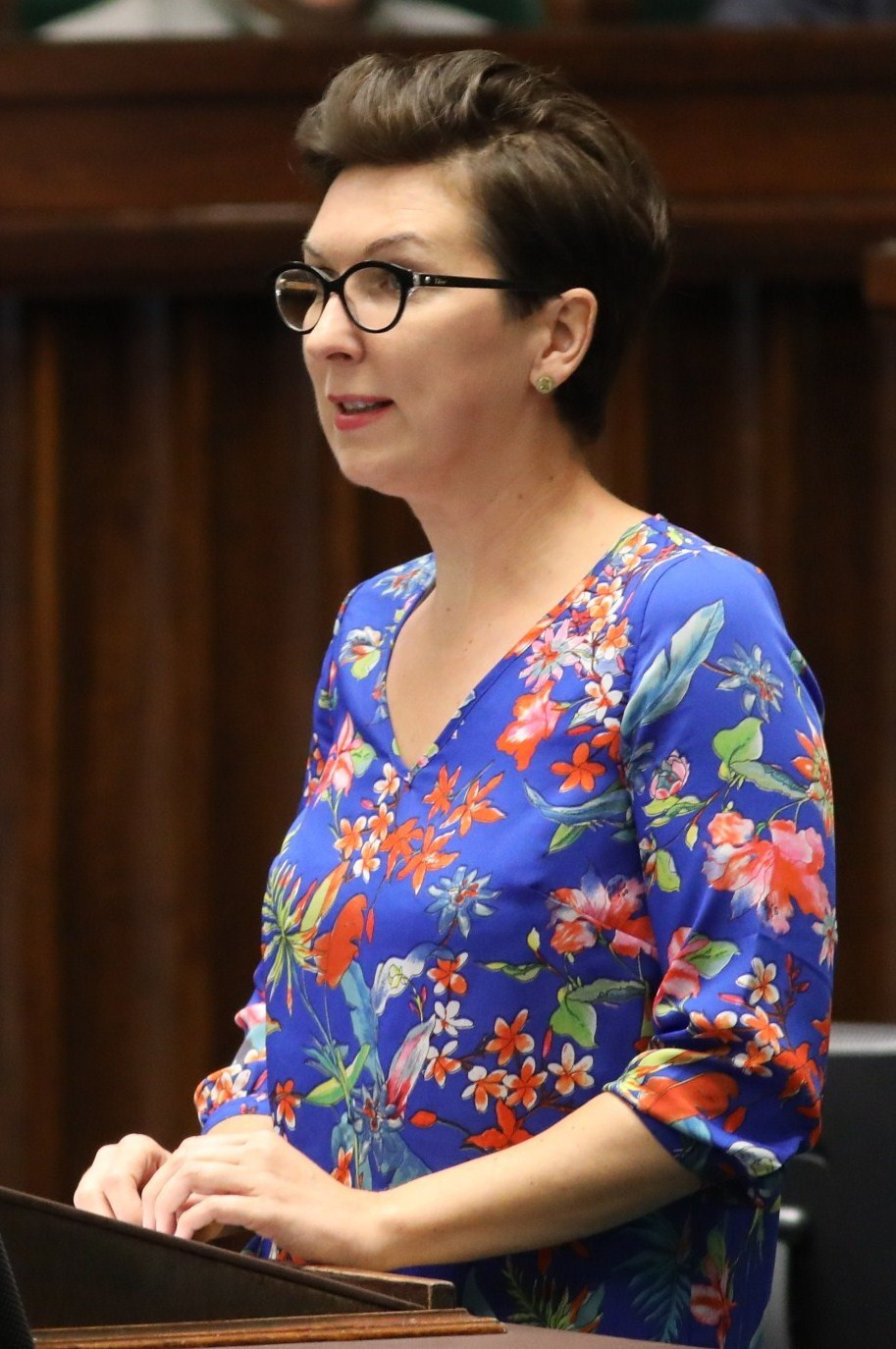 Katarzyna Osos, radca prawny i polityk.